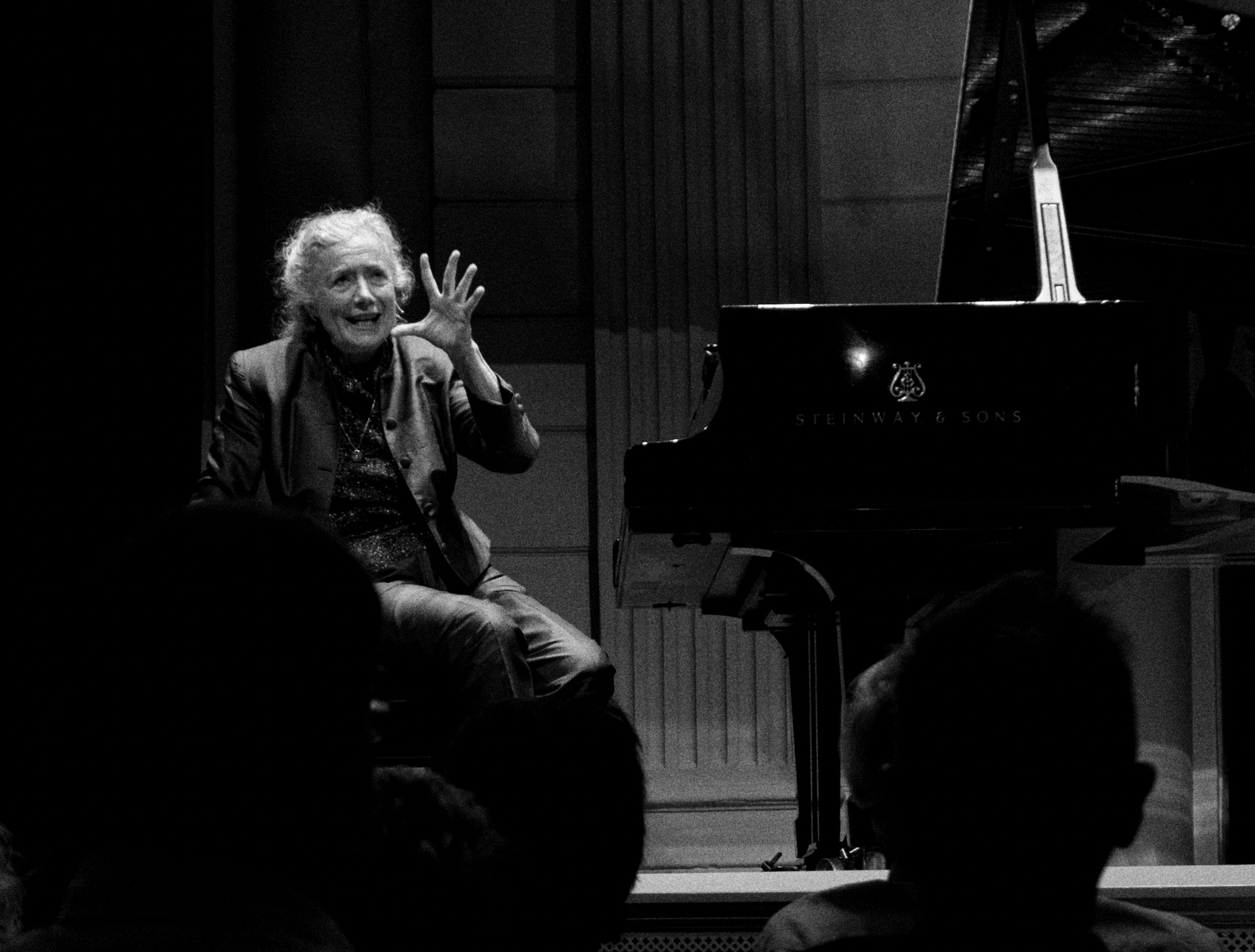 Barbara Nissman pianist